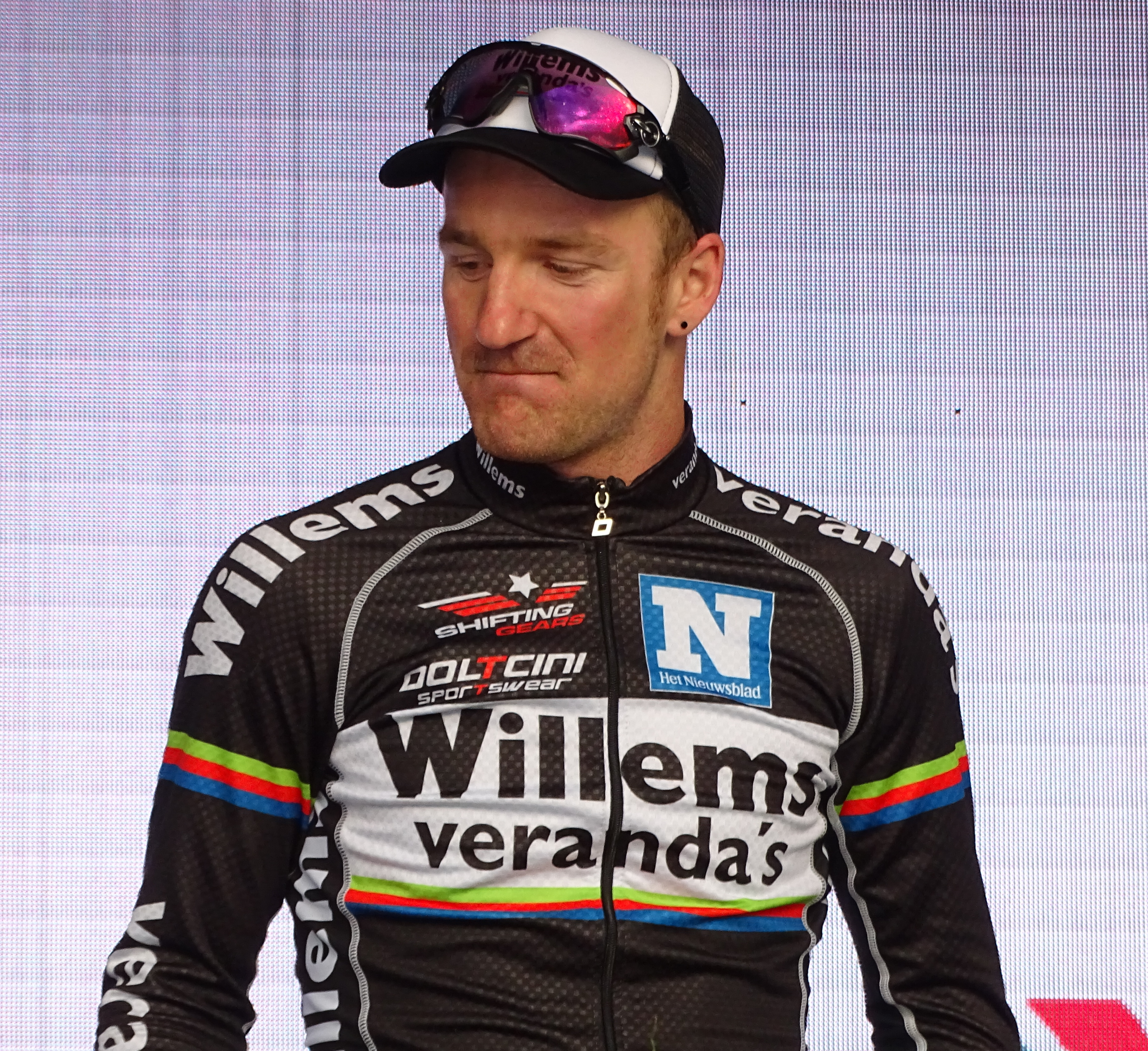 Reportage réalisé le mercredi 18 mars à l'occasion de l'arrivée de la Nokere Koerse 2015 à Nokere (Kruishoutem), Belgique.